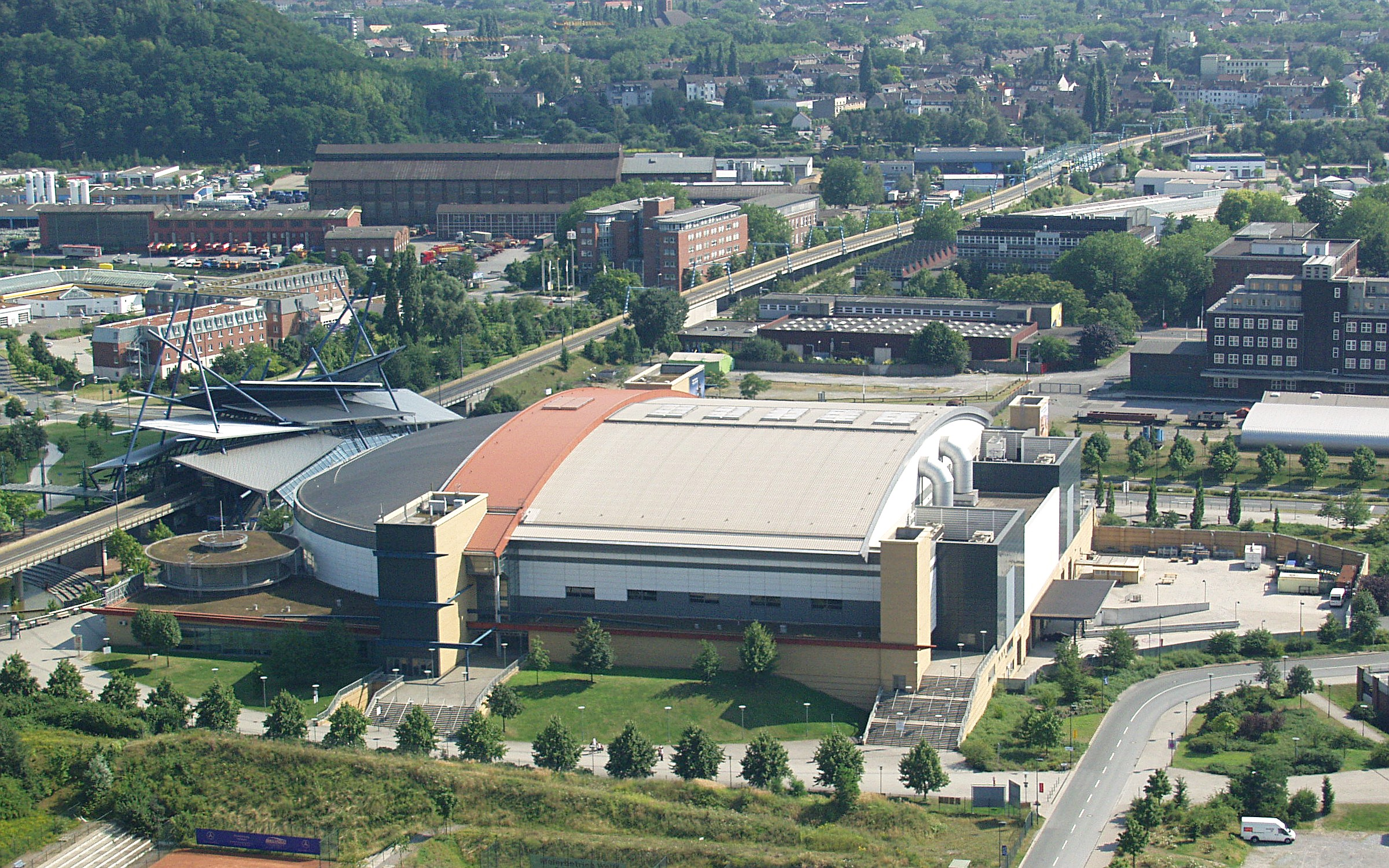 König-Pilsener-Arena in der Neuen Mitte Oberhausen, Oberhausen